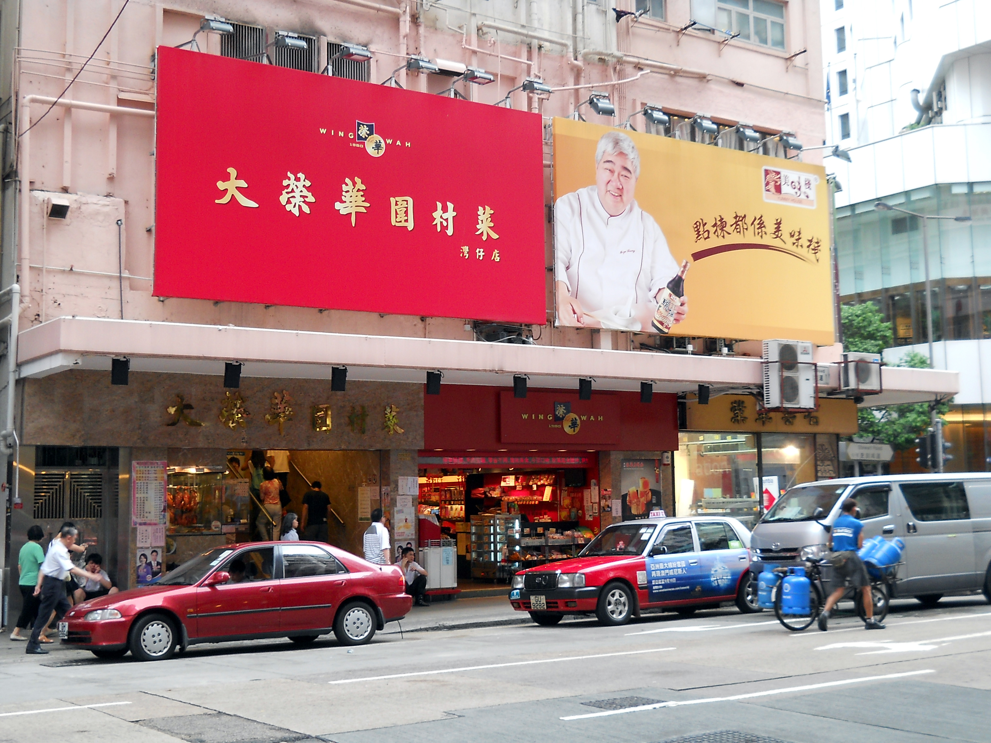 中文（香港）: 灣仔大榮華圍村菜